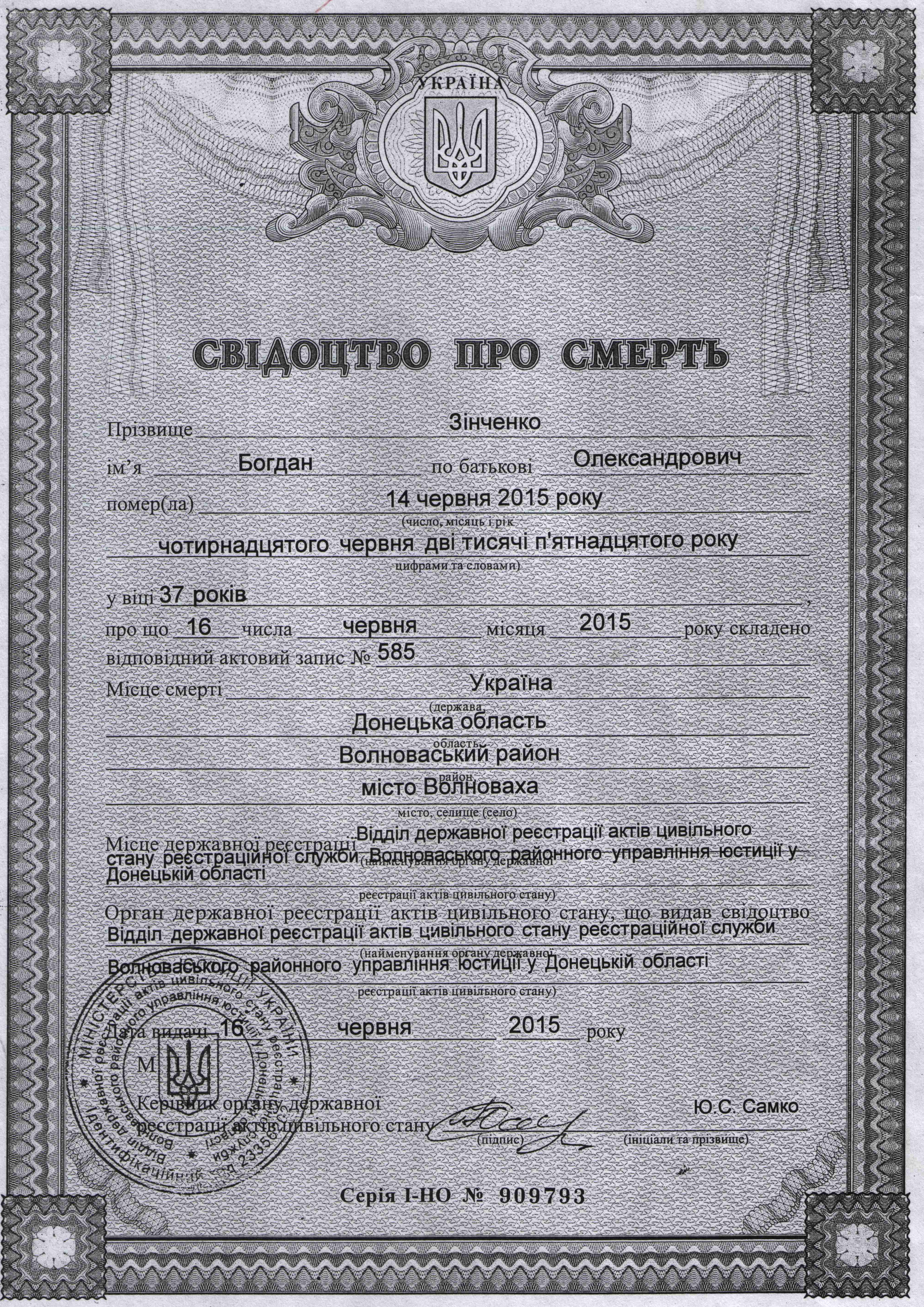 свідоцтвопросмерть